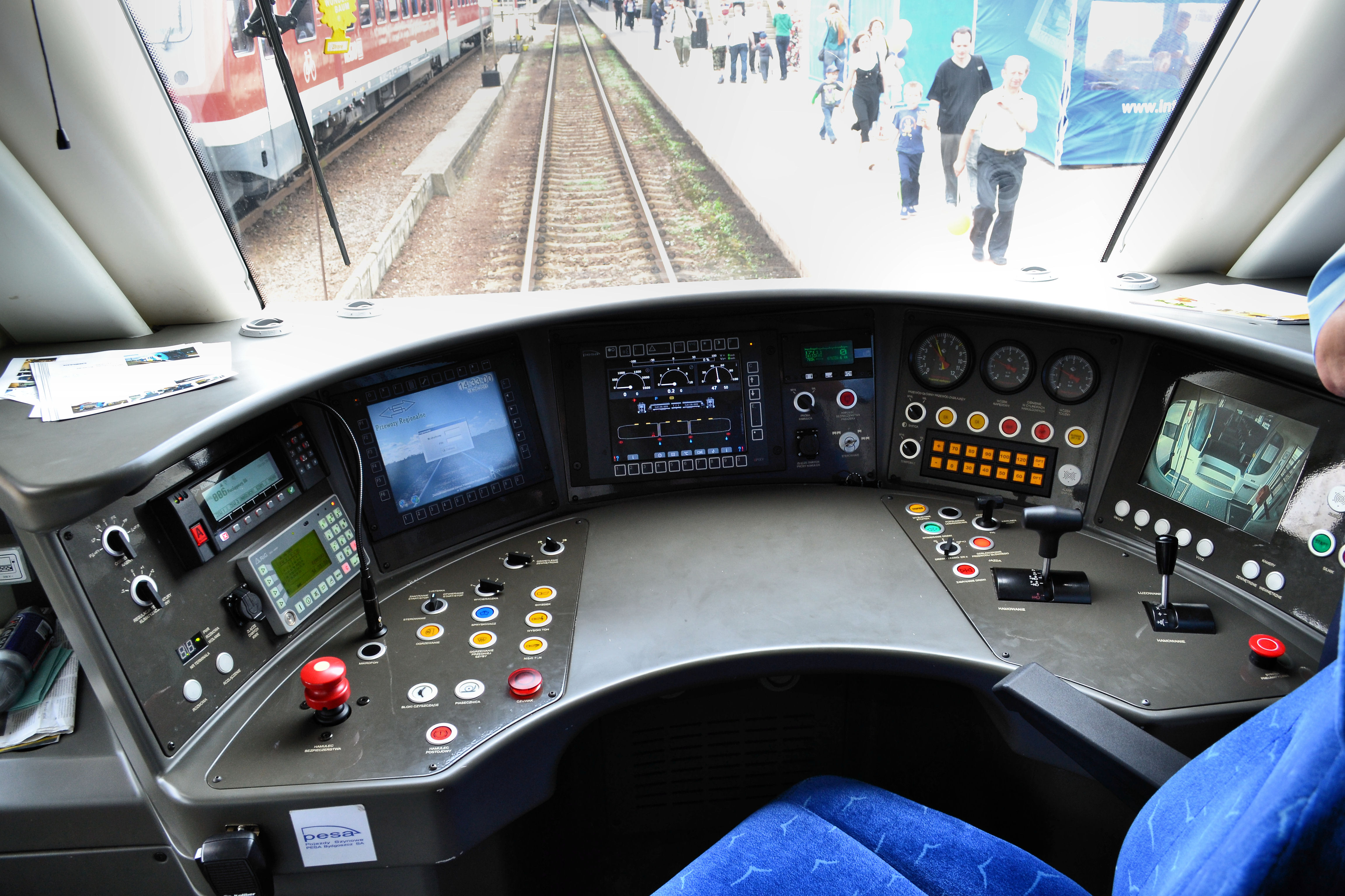 spalinowy zespół trakcyjny PESA SA136 - stanowisko maszynisty